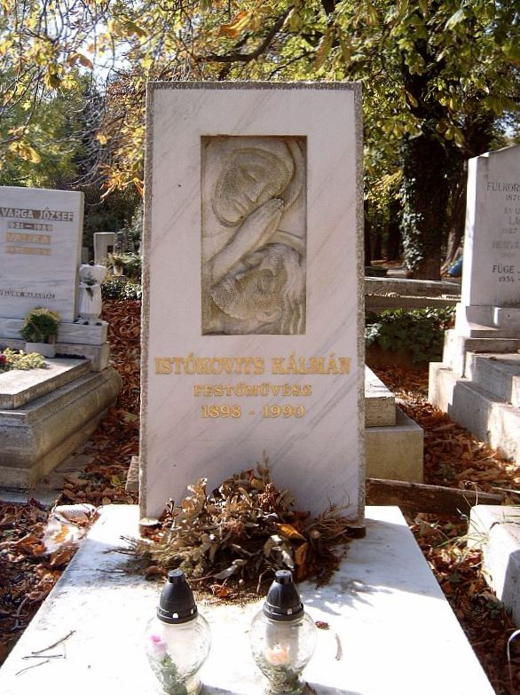 Istókovits Kálmán [Istokovics, Istókovics, Istokovits](Siklós, 1898. szeptember 2.–Budapest, 1990. október 21.) festő- és grafikusművész sírja. Búza Barna szobra, 2002. Márvány dombormű. Budapest XII. kerület, Farkasréti temető: 31-2-97 [szobrász: Búza Barna].